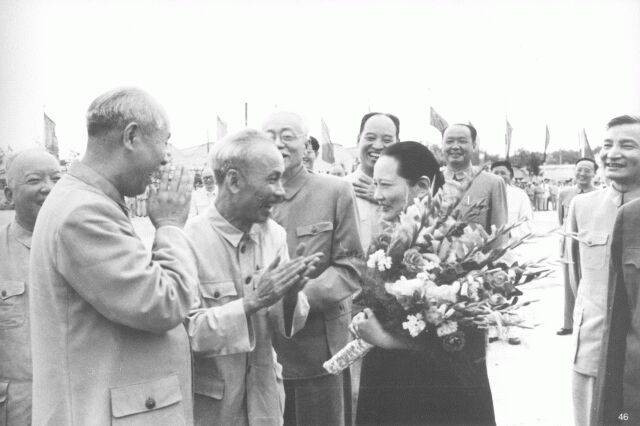 1956年，越南民主共和国主席胡志明访问中国。宋庆龄向胡志明献花。